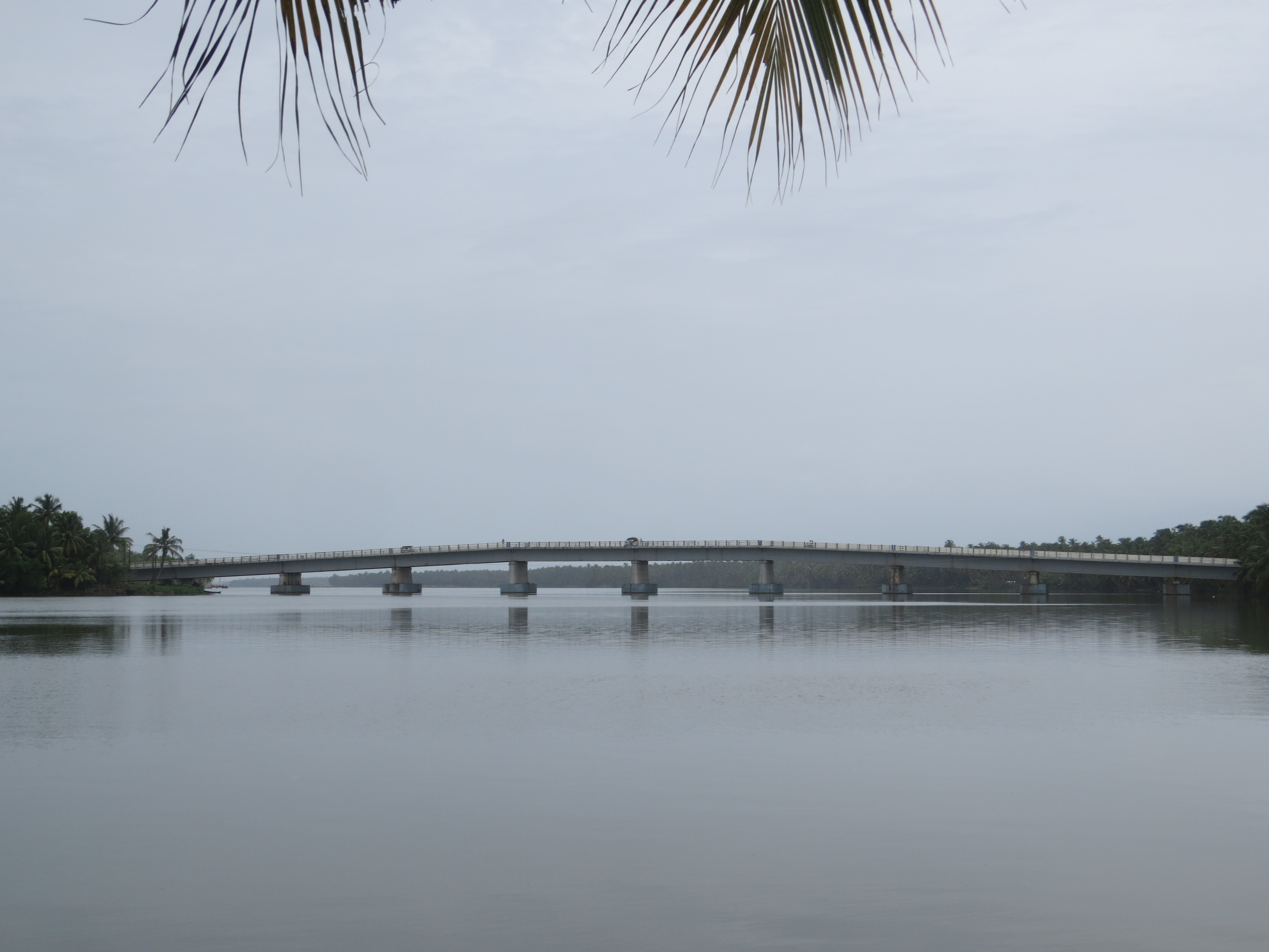 Photos taken at Kavvayi backwaters, Payyannur, Kerala